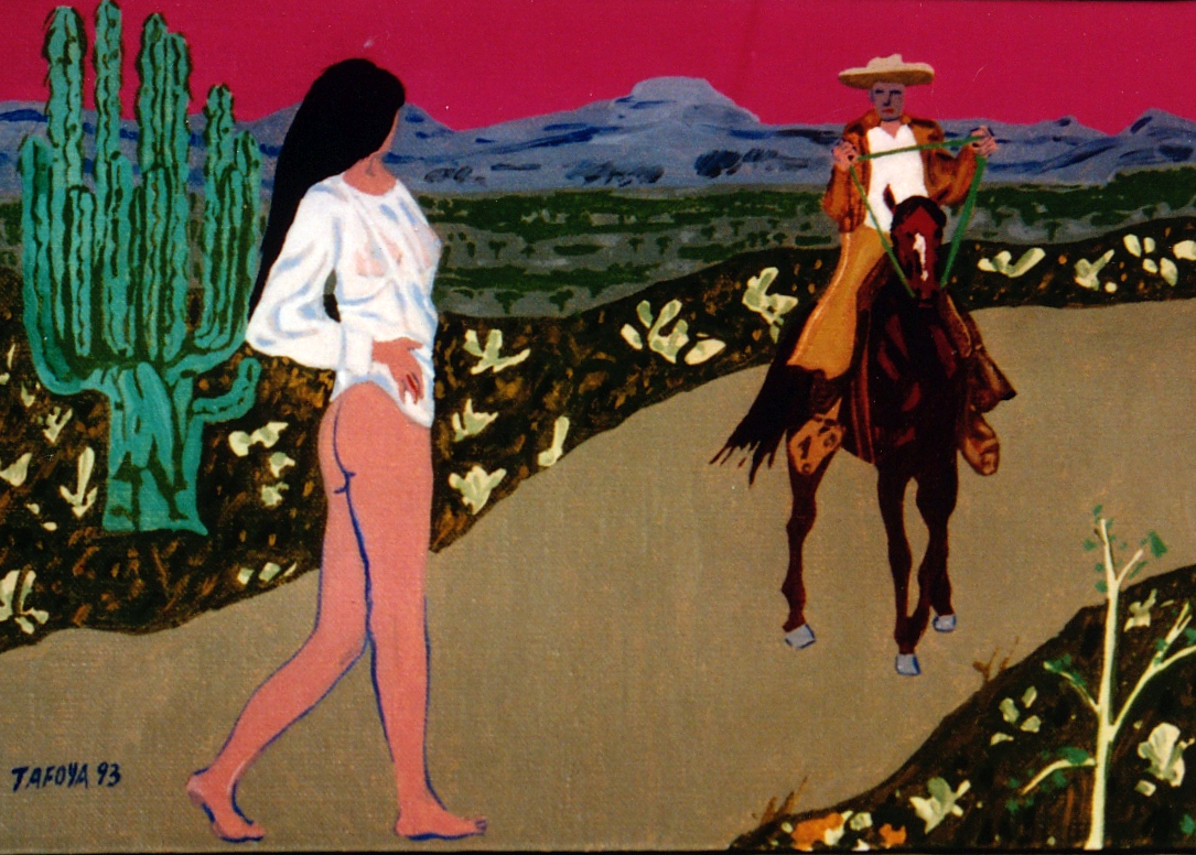 cuadro de un encuentro imaginario